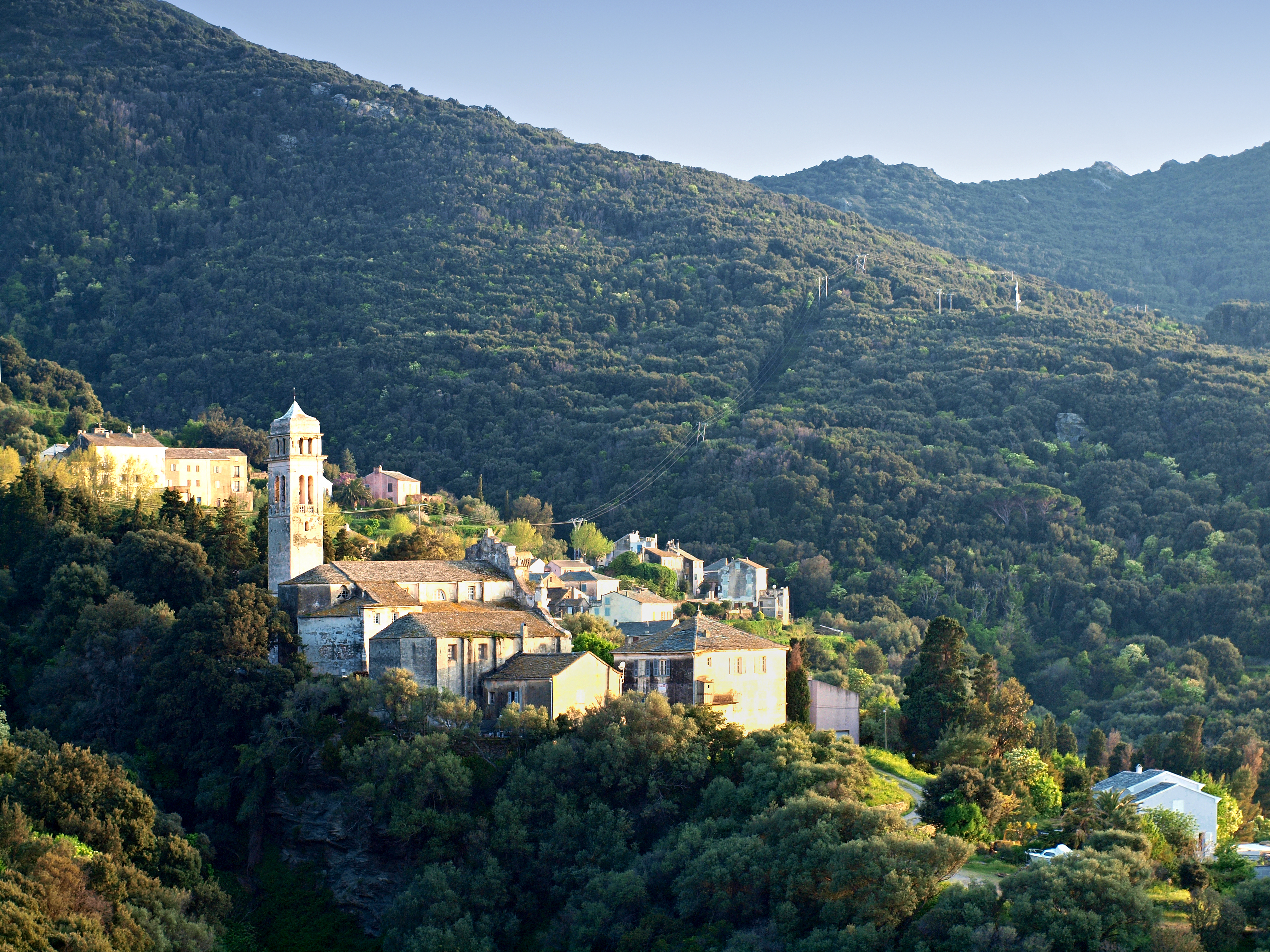 Pino (Corsica) - Vue du village